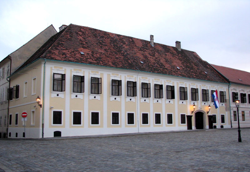 Banski dvori nakon obnove pročelja 2009. godine